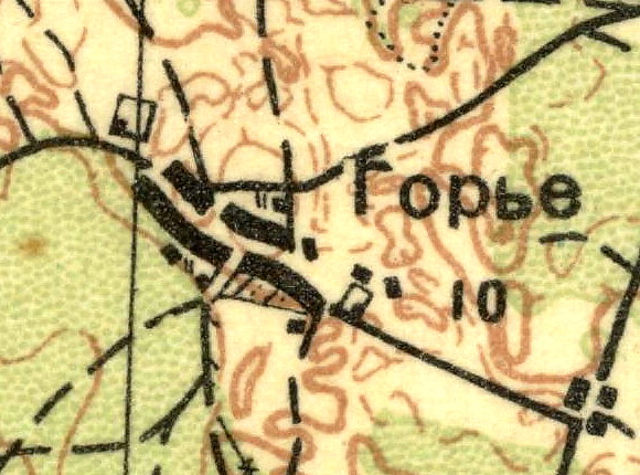 Топографическая карта Ленинградской области, квадрат О-35-23-Г (Волосово), деревня Горье